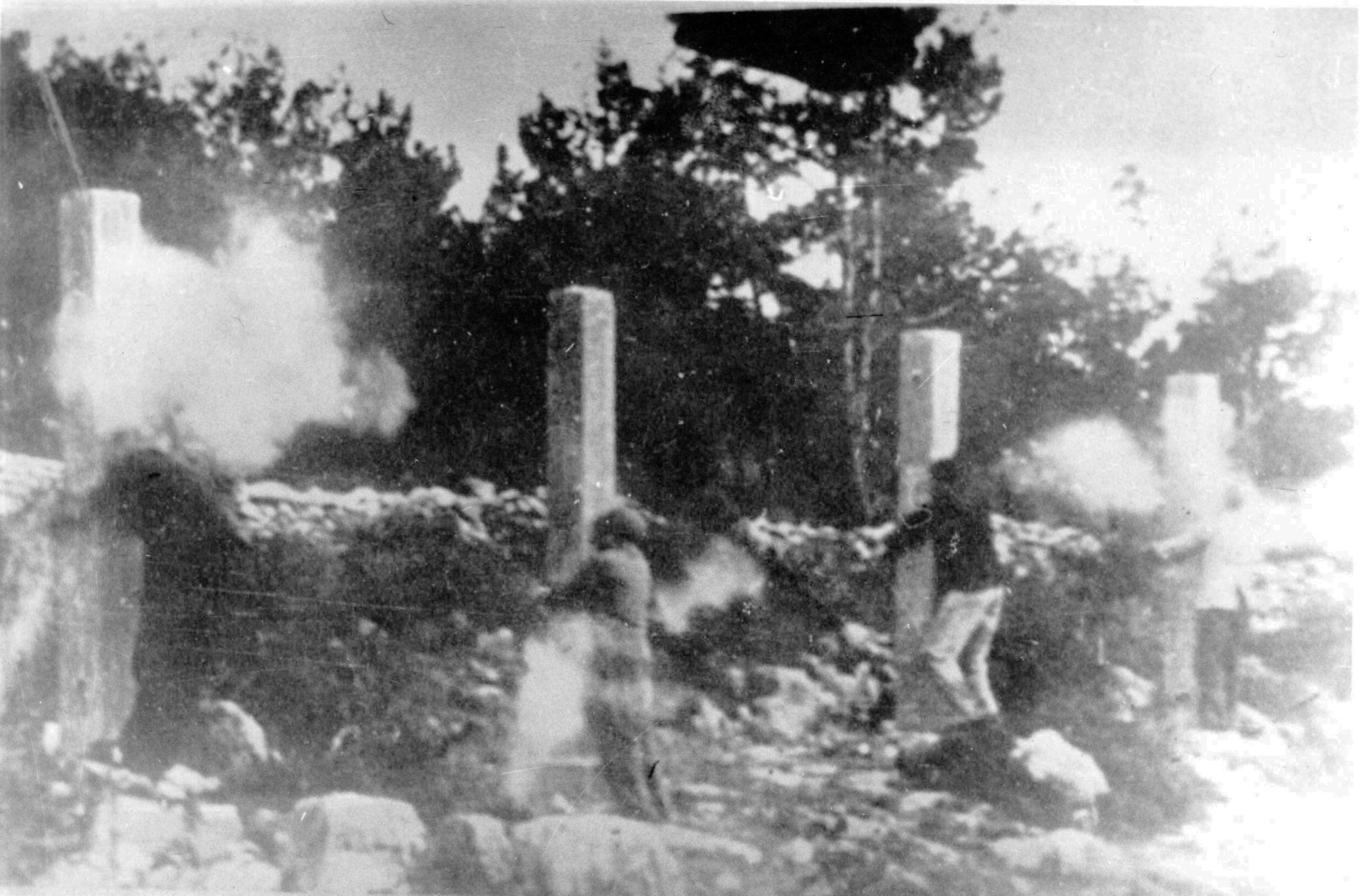 Srpskohrvatski / српскохрватски: Streljanje Rade Končara i drugova u Šibeniku 22. V. 1942.